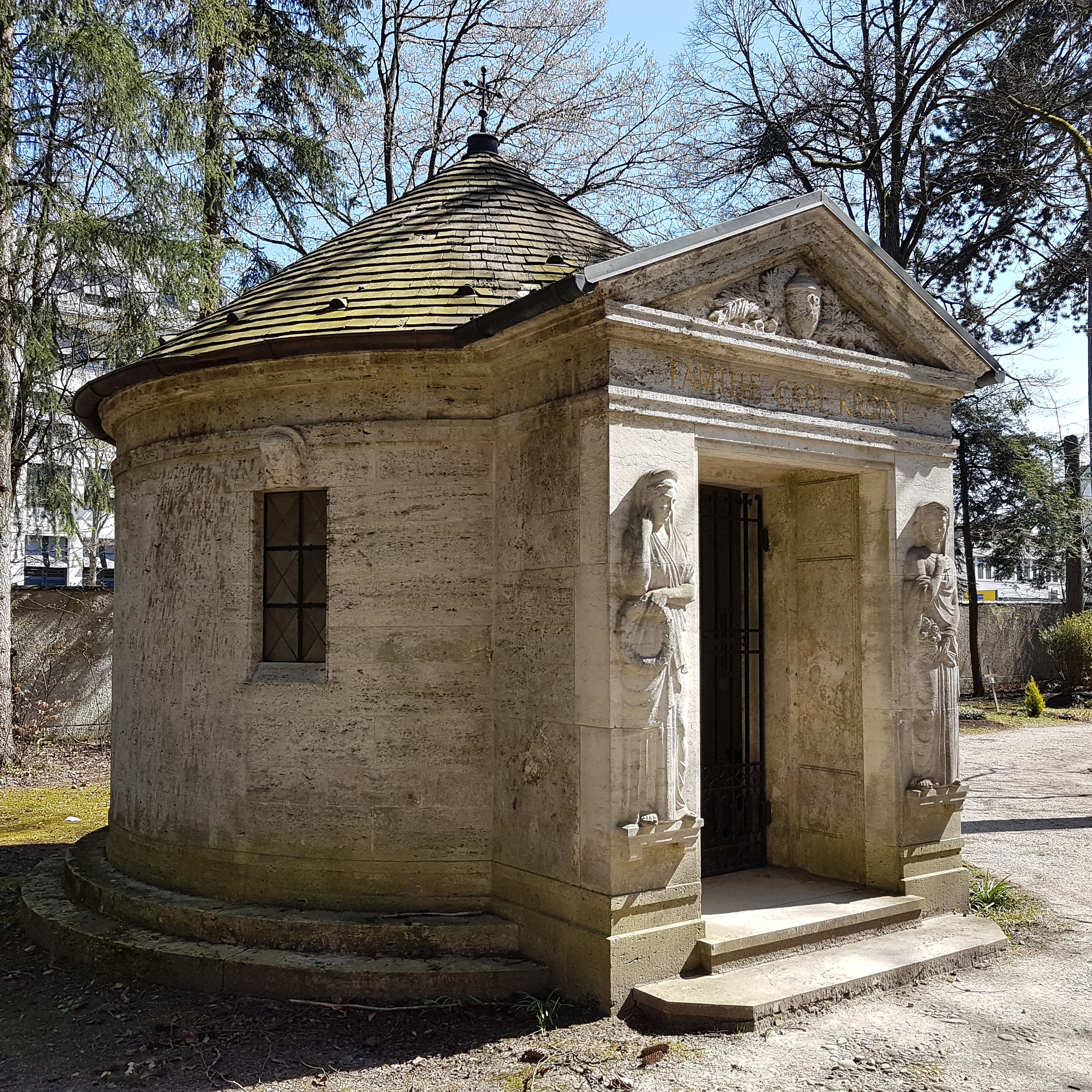 Waldfriedhof (München), Grabkapelle der Familie Krone.